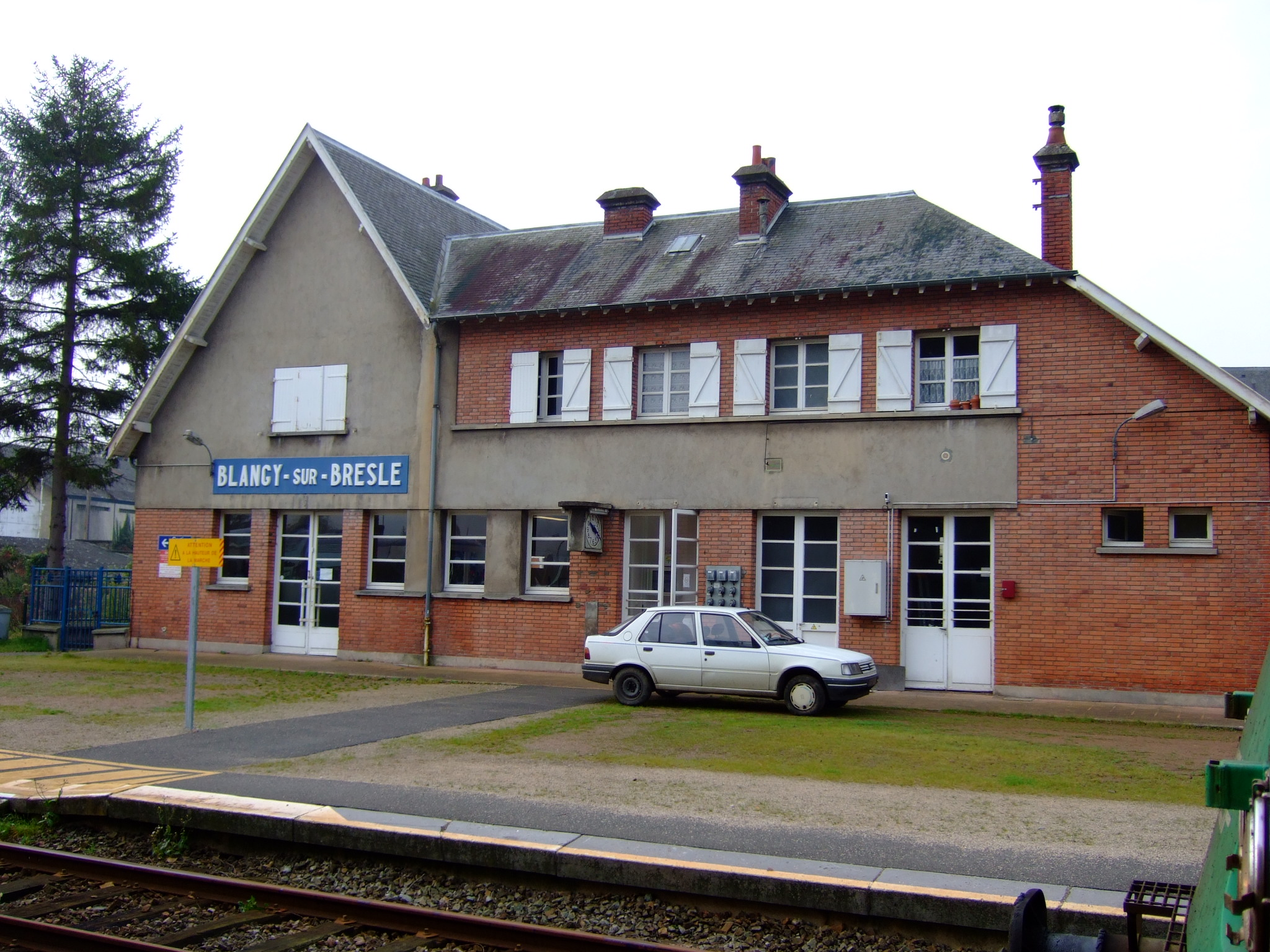 La gare de Blangy-sur-Bresle